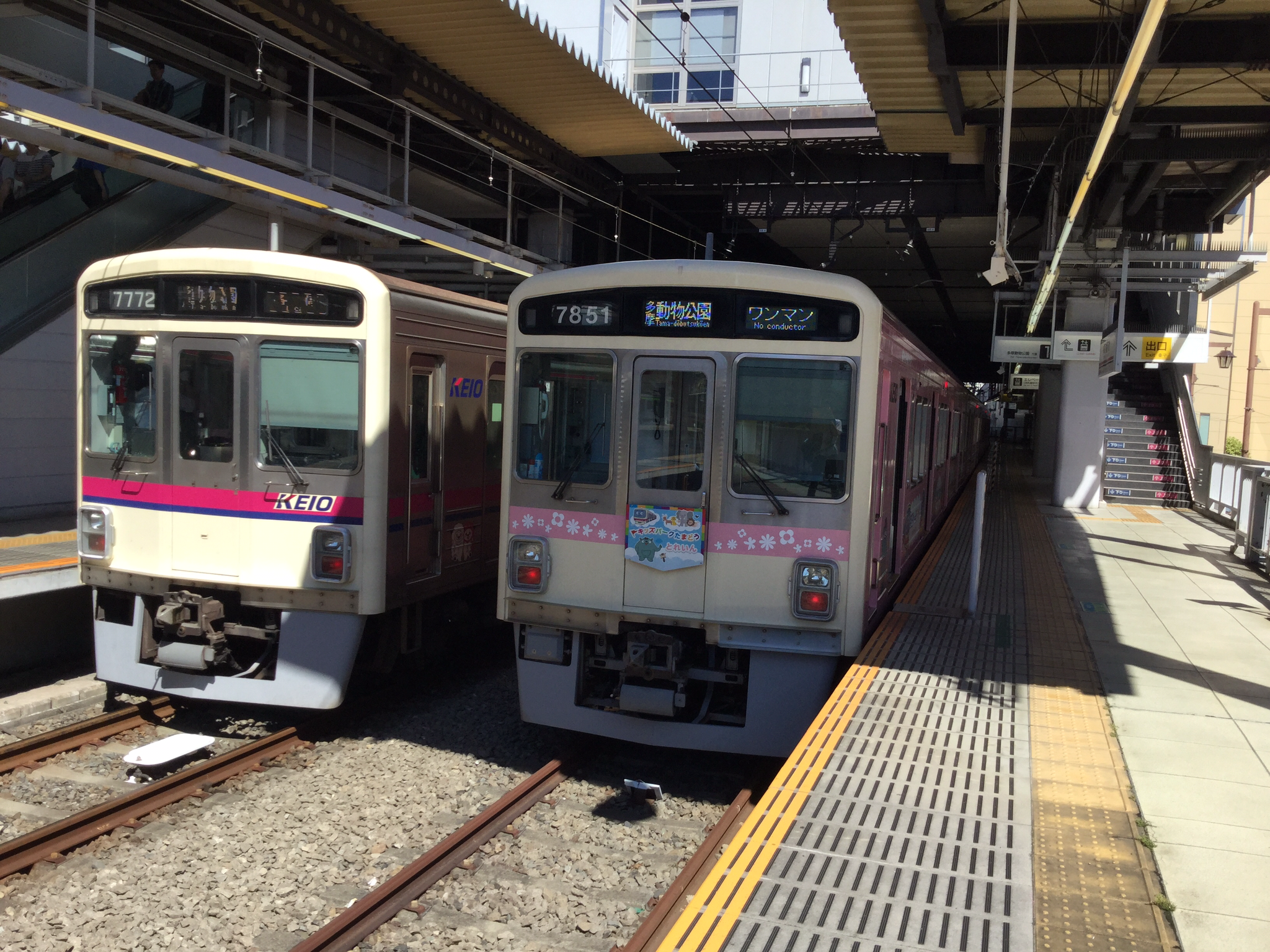 ？ラグビー」、「キッズパークたまどう」ラッピング編成の並び